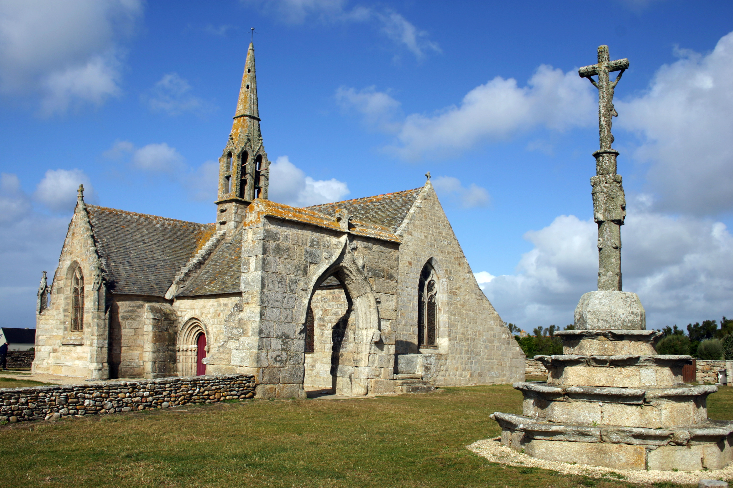 Chapelle et le calvaire de Notre-Dame de Penhors-Pouldreuzic-finistère-Bretagne-France . Object location47° 56′ 25.77″ N, 4° 23′ 58.29″ W